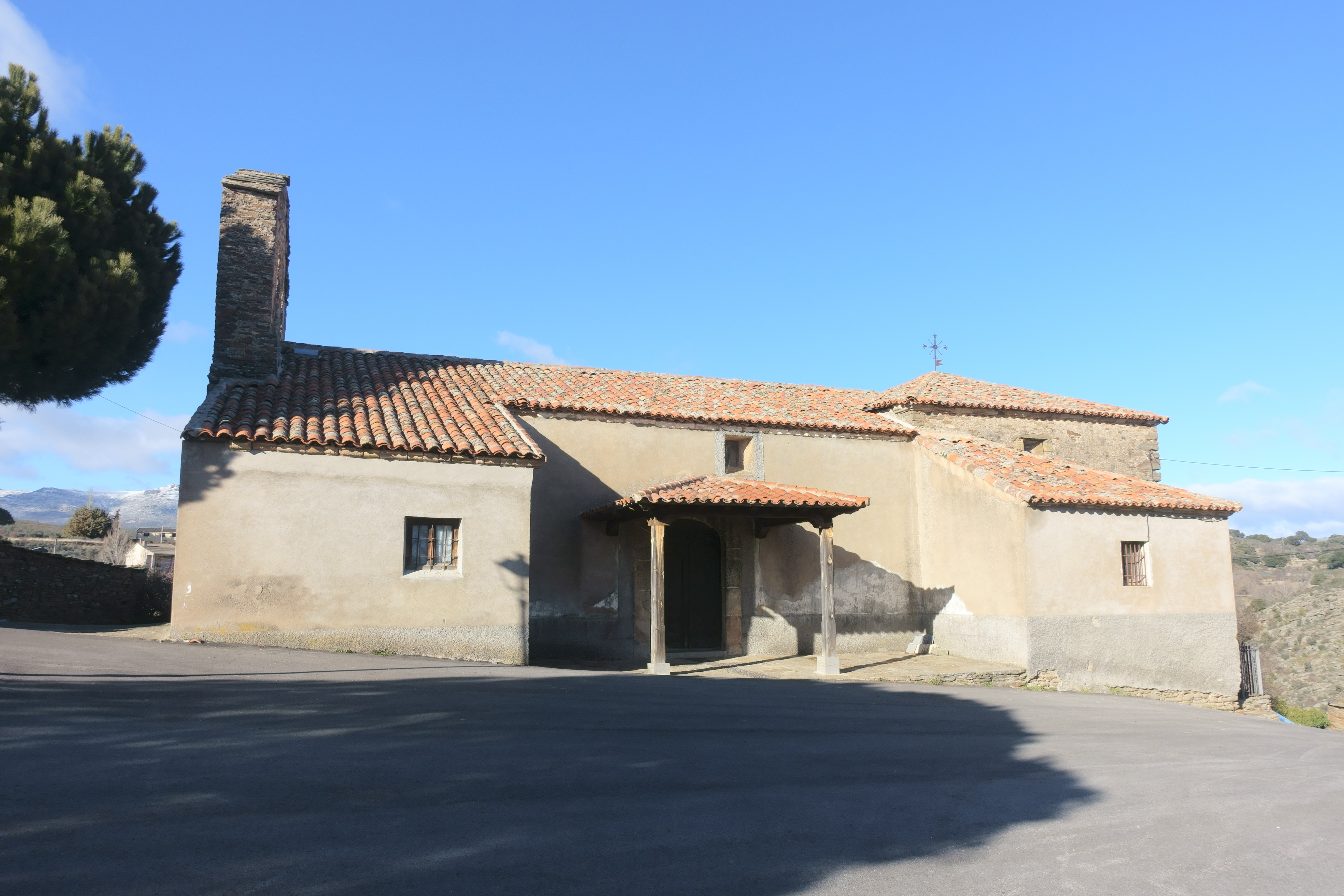 Iglesia de la Natividad de Nuestra Señora, en Villares de Jadraque (Guadalajara, España).